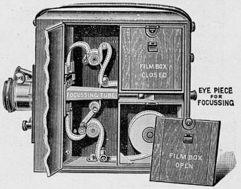 Caméra Urban Bioscope 35 mm ouverte (1902) . Conçue par le Britannique Charles Urban. On voit le tube optique de vision à travers la pellicule. On remarque le magasin double (ouvert au niveau de la pellicule déjà exposée).